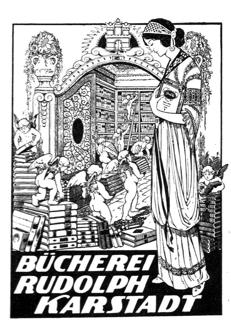 Ex libris Rudolph Karstadt (Klischeedruck um 1910)